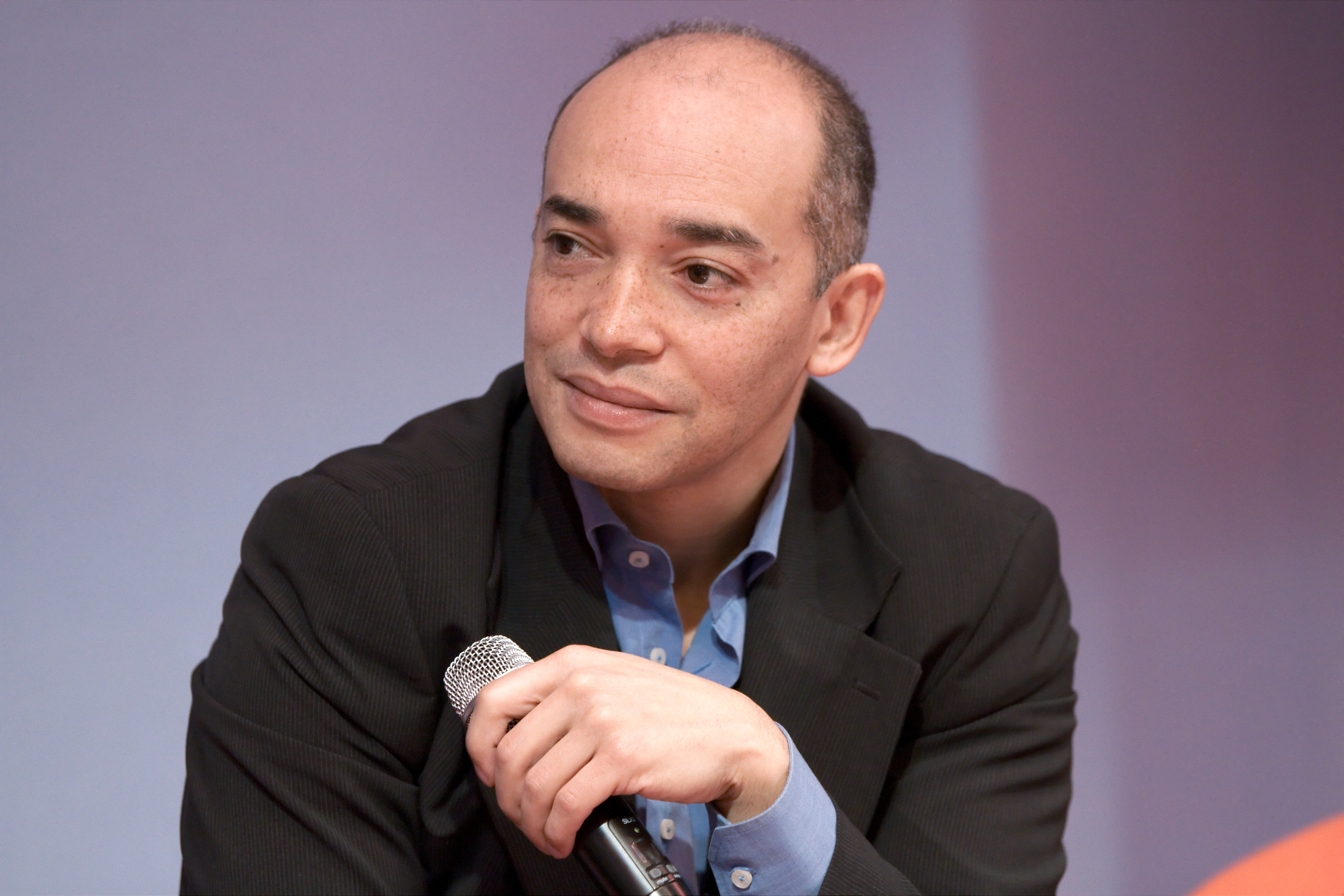 Fabrice d'Almeida au Salon du livre de Paris lors du débat Les chemins de l'enfer.